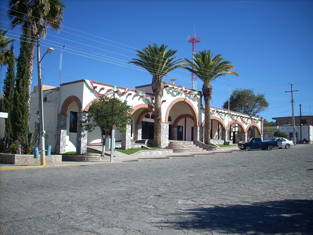 Muy buen monumento